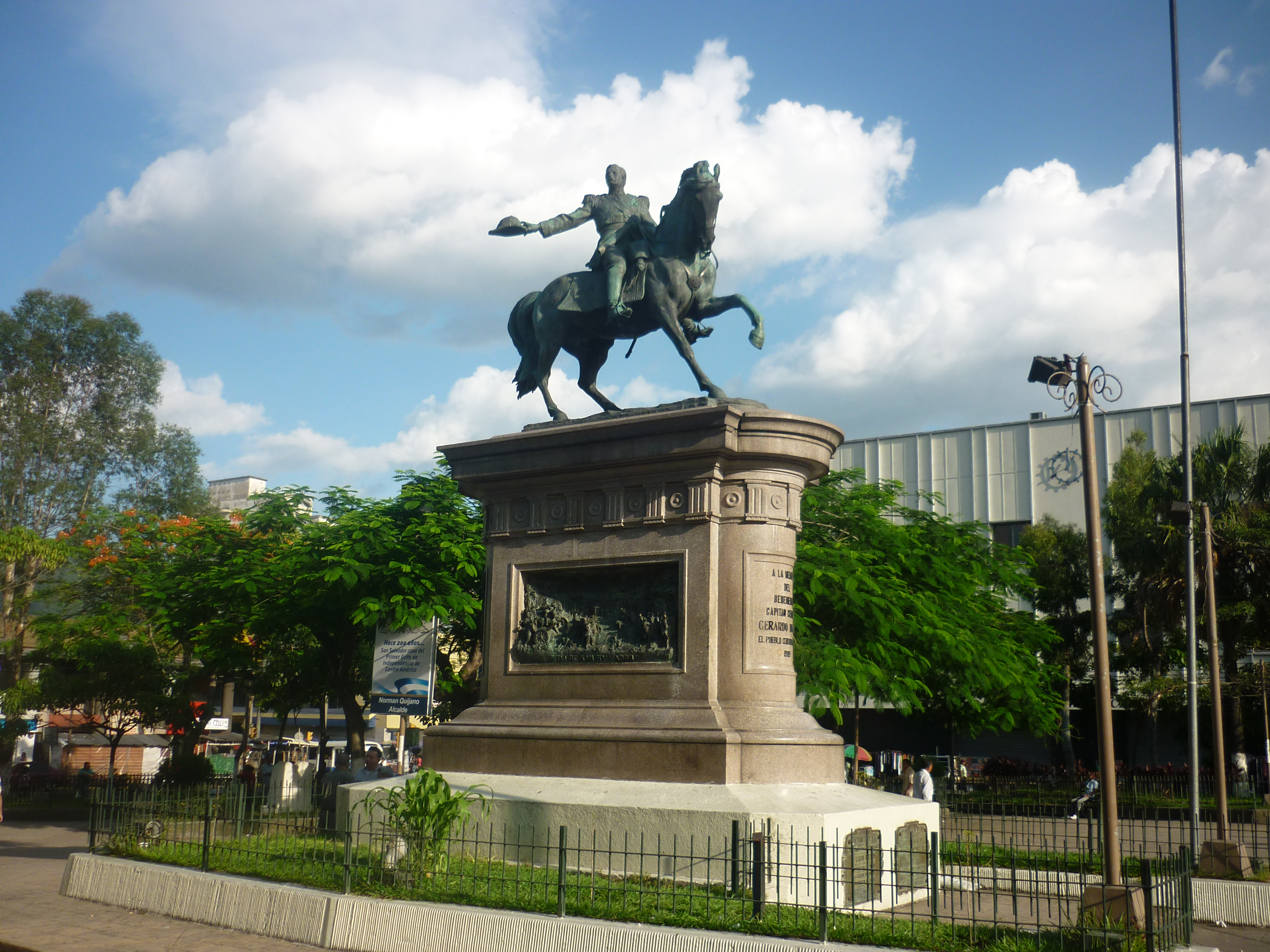 Estatuta Ecuestre del General Barrios, obra de Francisco Durini